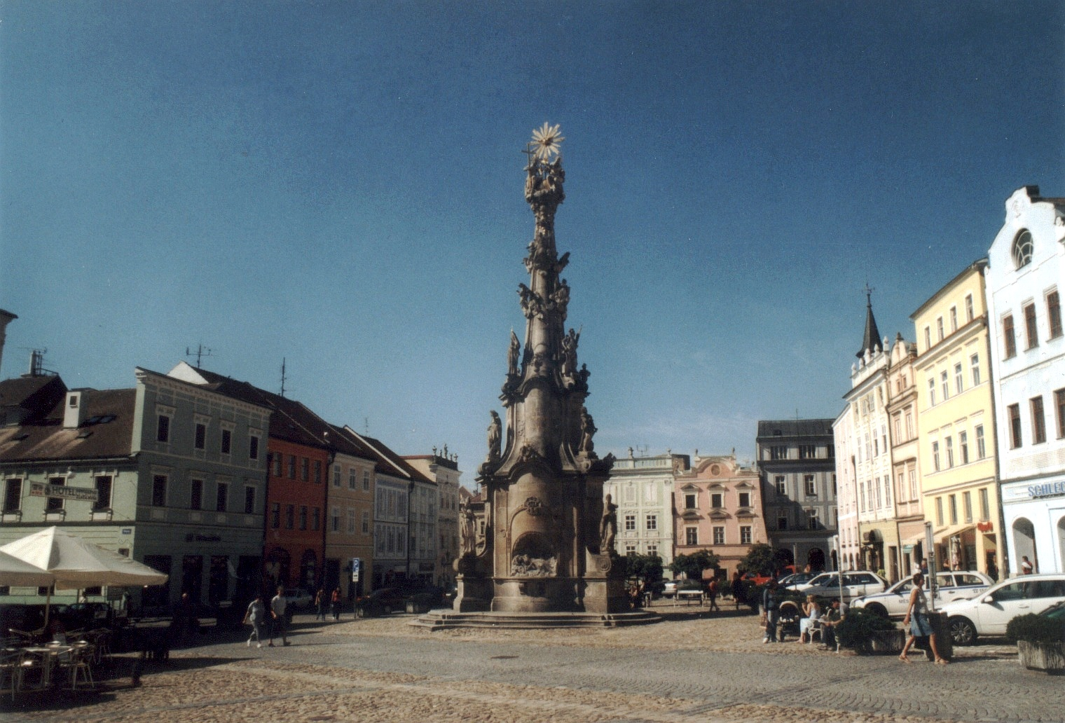 Česky: pozdně barokní trojiční sloup na náměstí v Jindřichově hradci